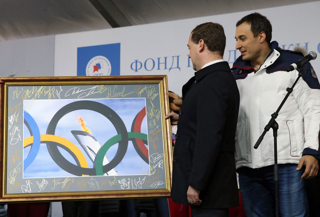 Олимпийский чемпион Алексей Воевода вручает Председателю Правительства РФ подарок с автографами олимпийской сборной России. 27 февраля 2014 года